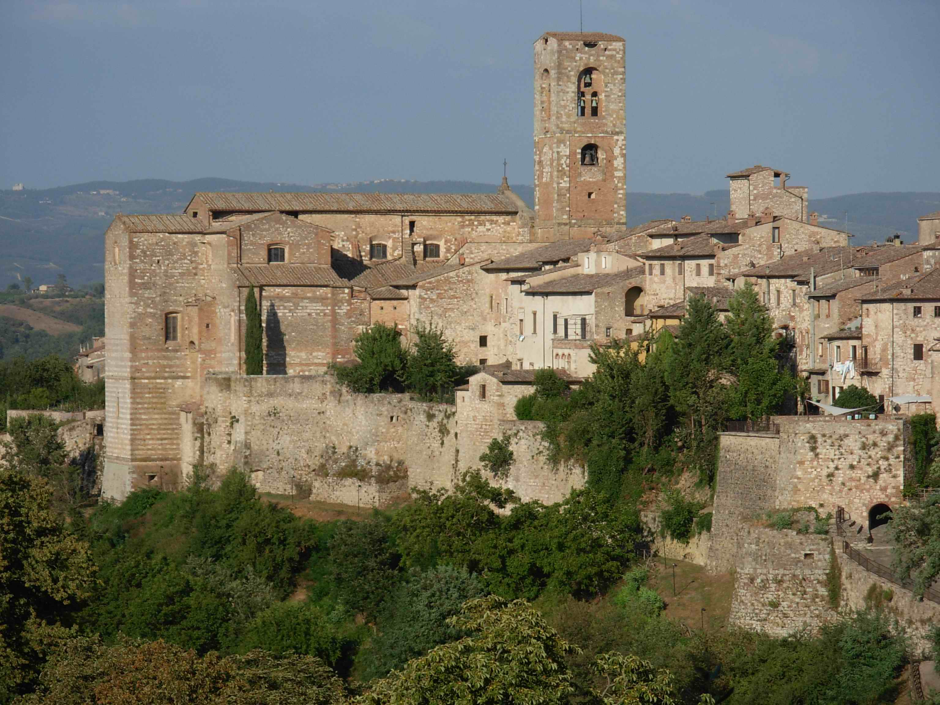 Colle di Val D'Elsa - veduta del centro storico e del Duomo Foto del Borgo medioevale di Colle di Val D'Elsa con il Duomo